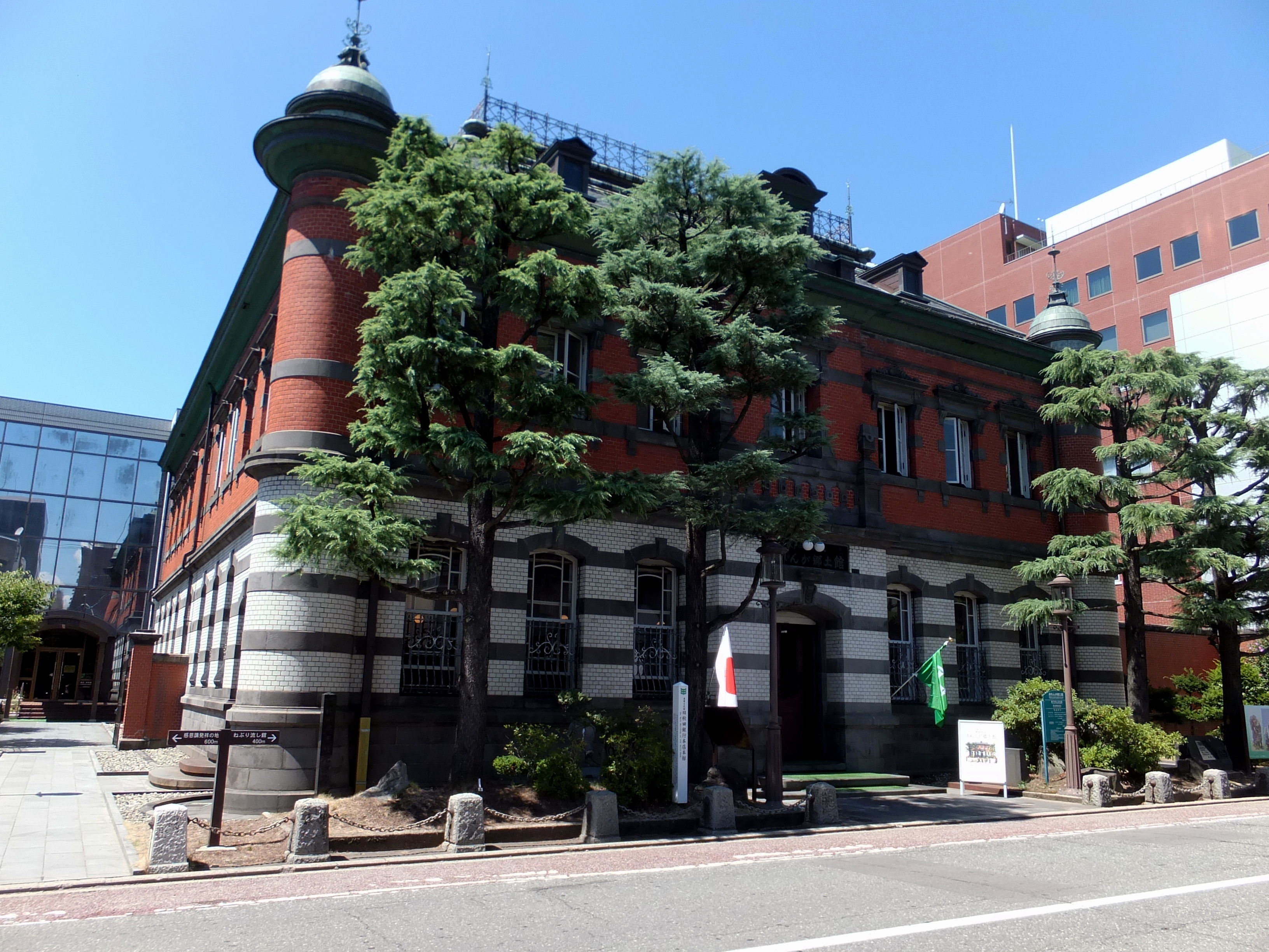 秋田市立赤れんが郷土館（秋田市大町）。旧秋田銀行の本店として1912年に竣工した建物で、1981年に秋田銀行から秋田市に寄贈され、1985年に赤れんが郷土館として開館した。国指定重要文化財